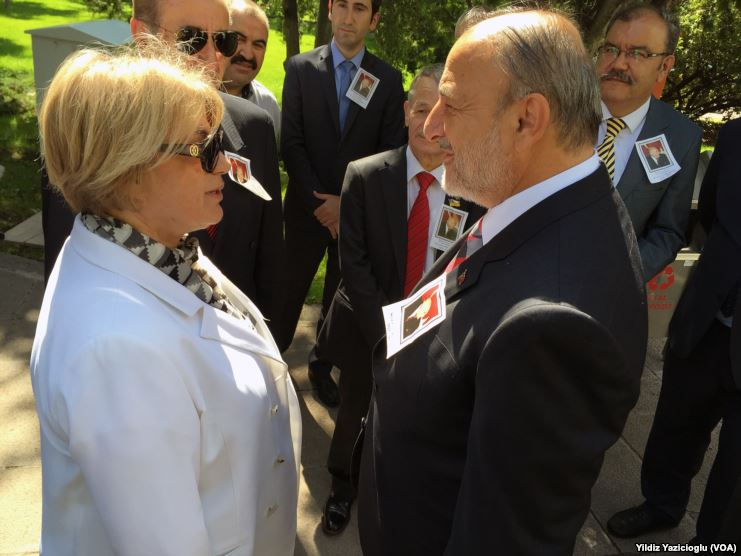 Süleyman Demirel Funeral